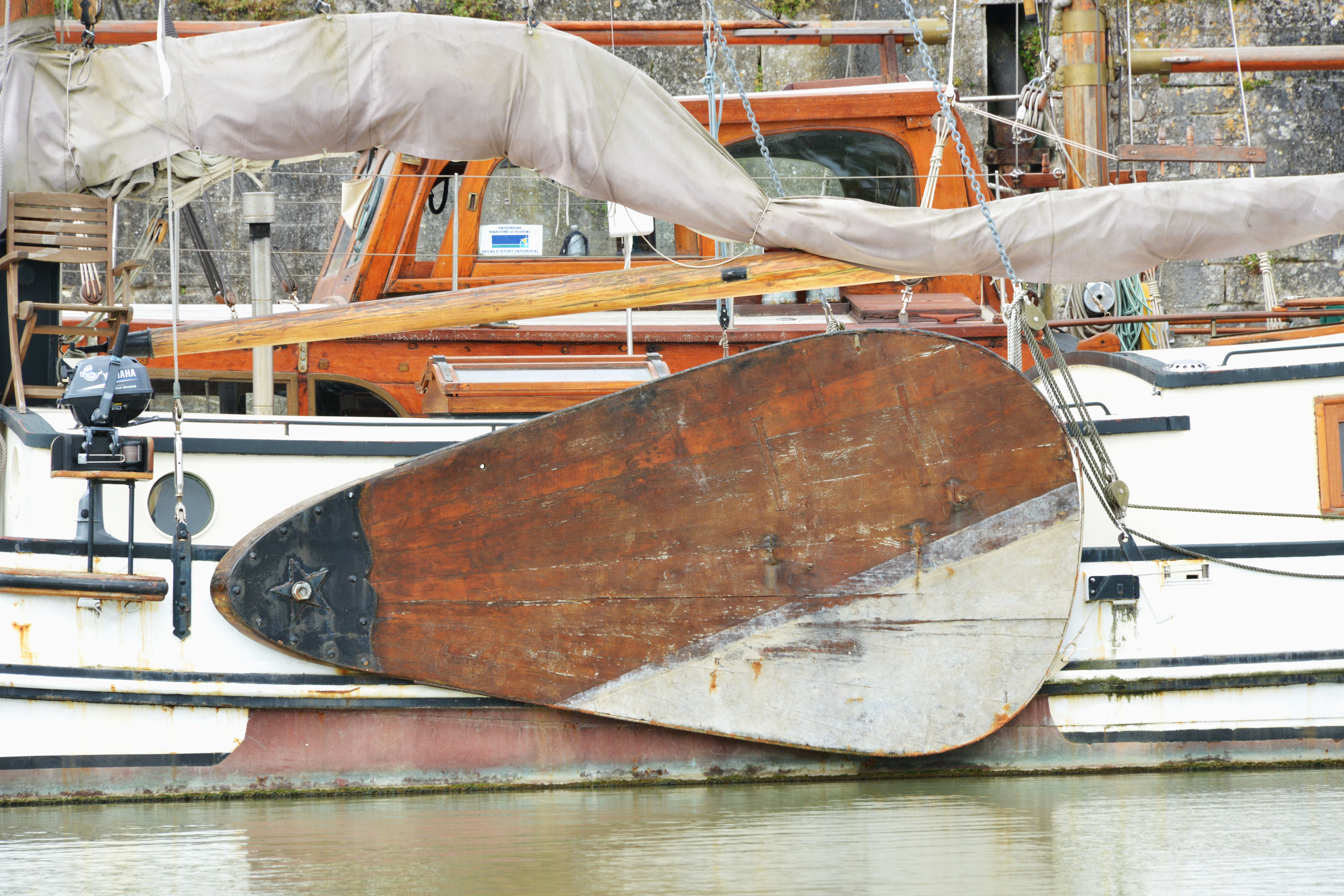 Le tjalk de Frise « De Dicke Door » (écrit « DE DICKEDOOR » sur le bateau) amarré dans le Bassin Lapérouse du port de plaisance de Rochefort. Ce bateau, maintenant, armé à la plaisance a été construit en 1896 comme bateau de charge. Longueur LHT : 18 mètres. Coque en acier. Immatriculation : LS E96251. « De Dicke Door » : « La Porte Epaisse ». Un « tjalk de Frise » (« Friese tjalk ») est un type de bateau de charge à voile hollandais mer/fleuve dont la construction est caractéristique à la Frise. Rochefort-sur-Mer, Charente-Maritime, France.